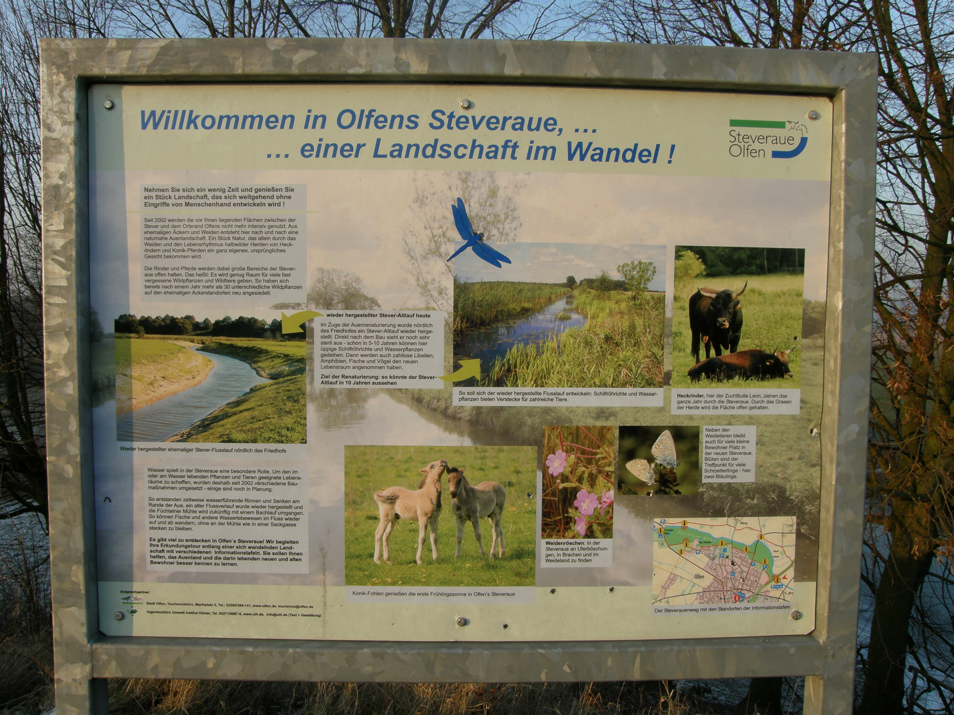 Aus der Alten Fahrt des Dortmund-Ems-Kanals in Olfen wurde ein Rad- und Wanderweg im Naherholungsgebiet "Olfener Steveraue".